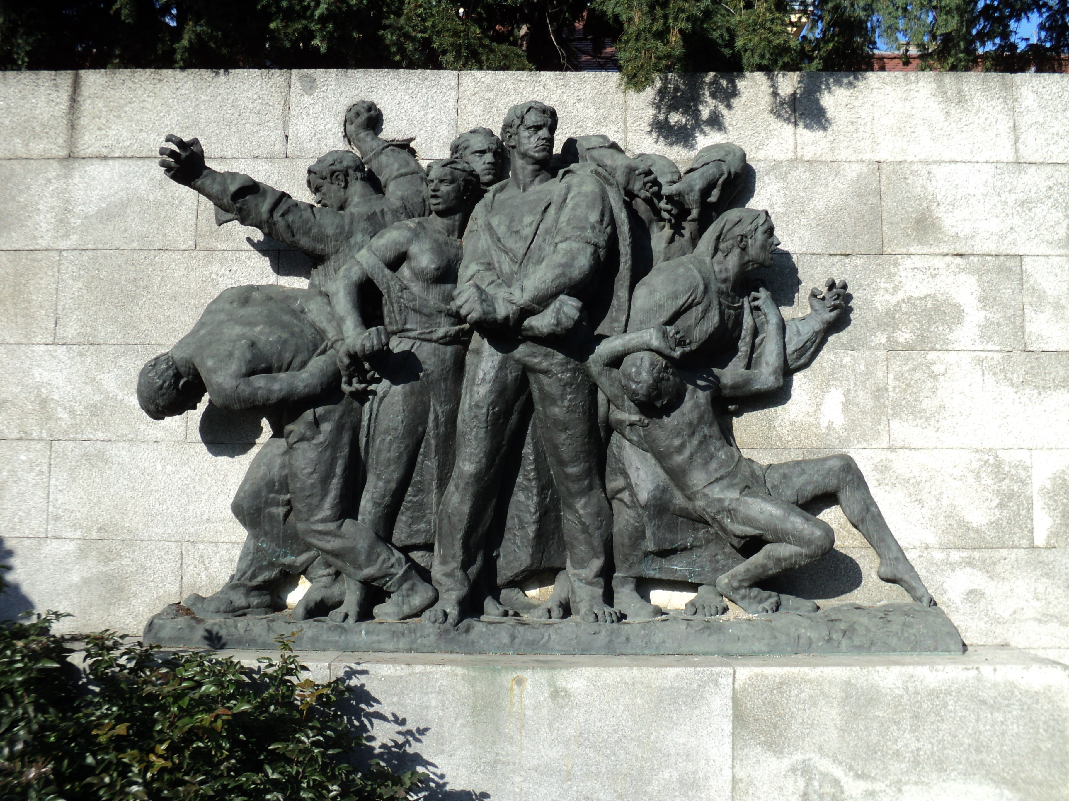 Spomenik Streljanje talaca u Zagrebu; autor: Frano Kršinić Licensing